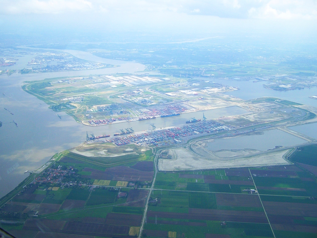 Waaslandhaven